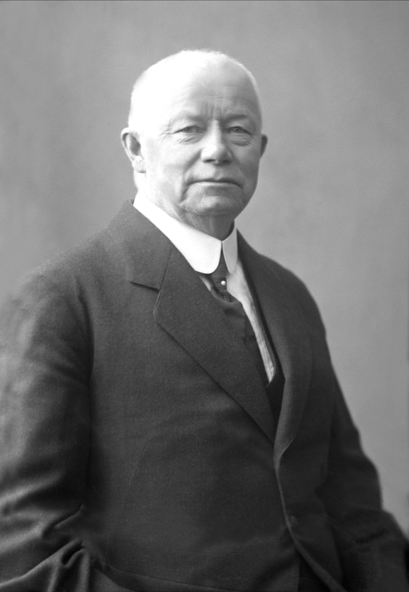 Oscar Strugstad (1851–1919), generalmajor, sjef for generalstaben og forsvarsminister (H).